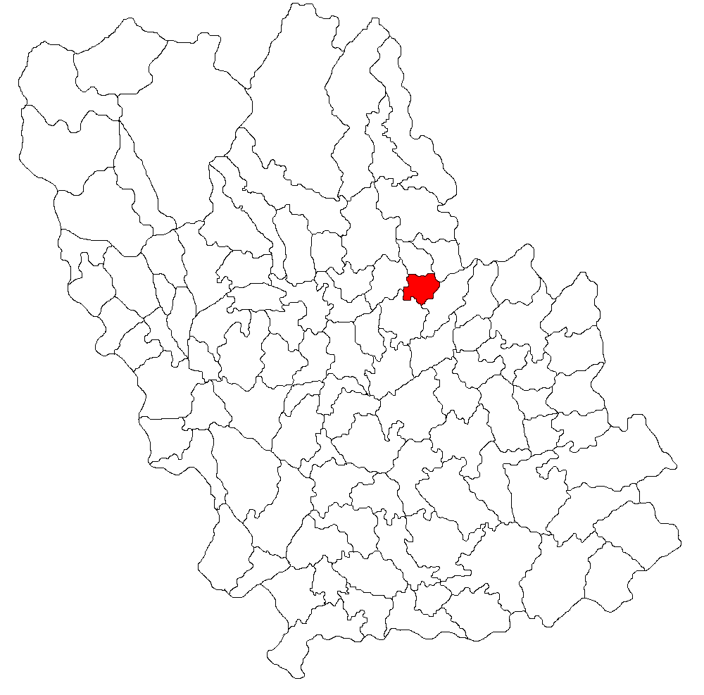 Categorie:Hărţi ale judeţului Prahova